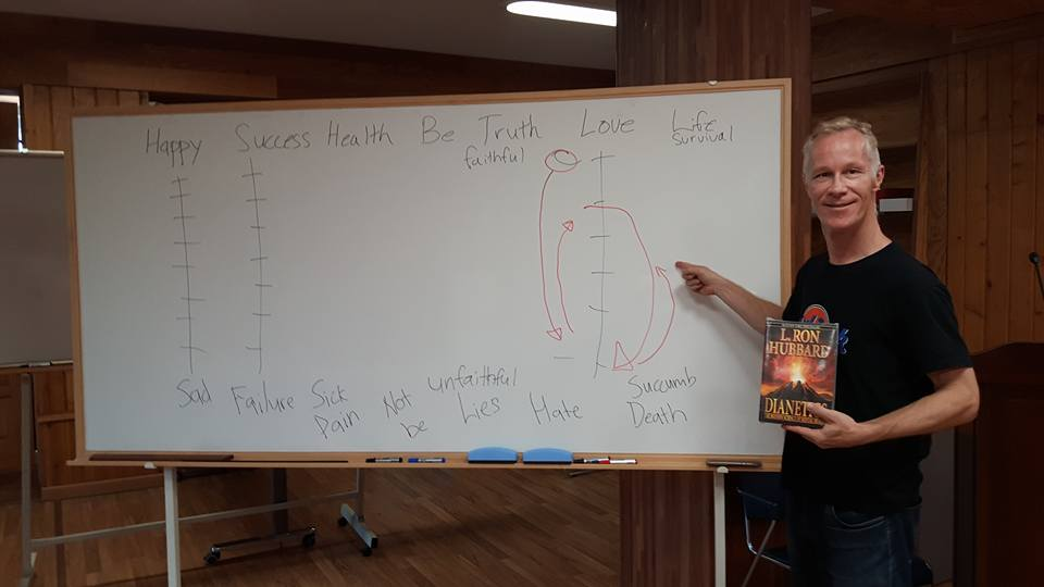 This is a Dianetics and Scientology lecture in 2016 in Cheongpyeong, South Korea.